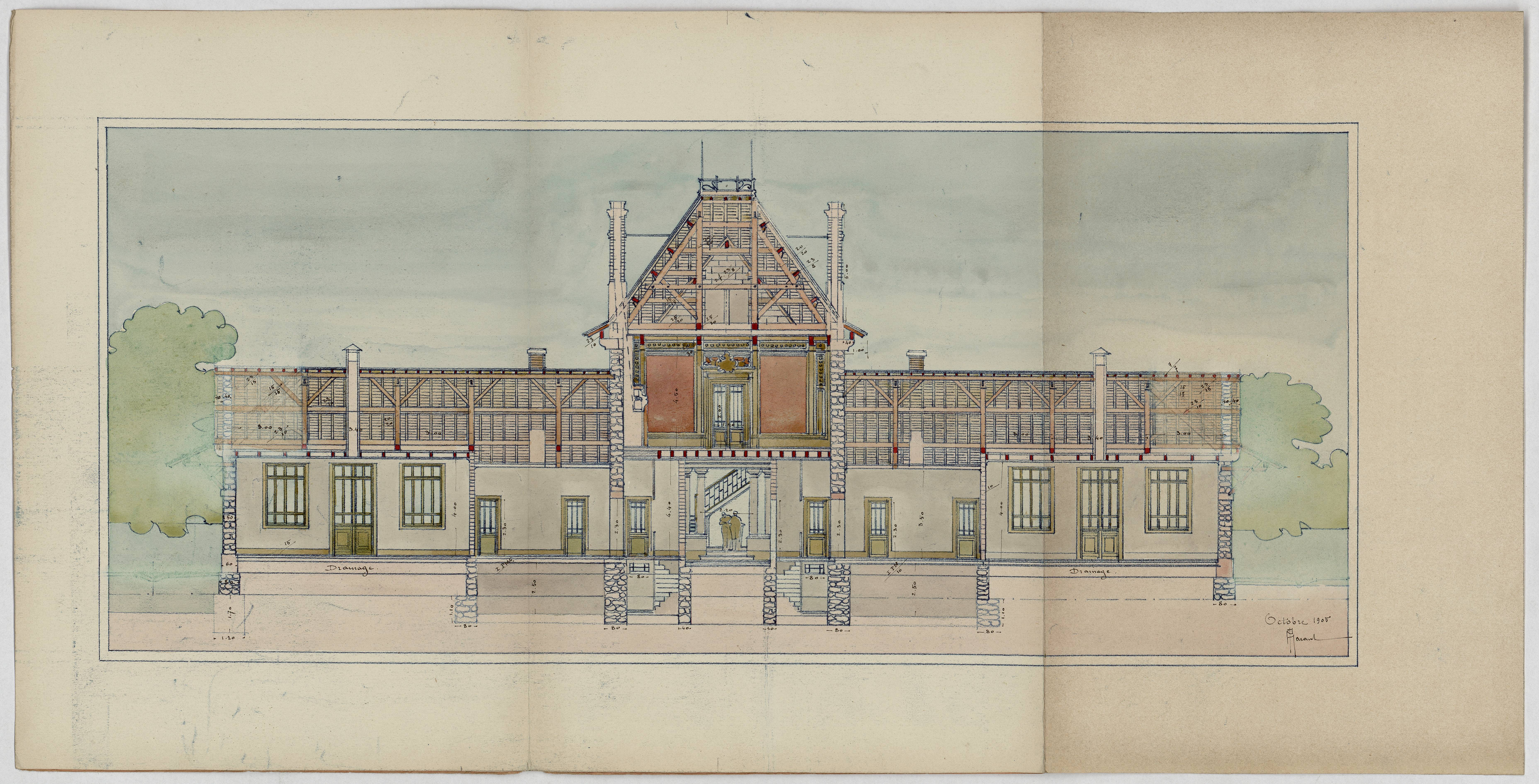 Camplong. - Construction d'un groupe scolaire : coupe longitudinale du bâtiment principal.